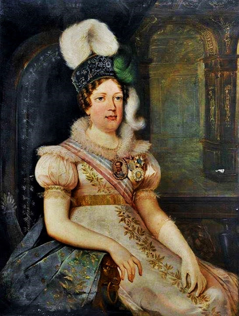 D. Leopoldina cerca do ano de 1817